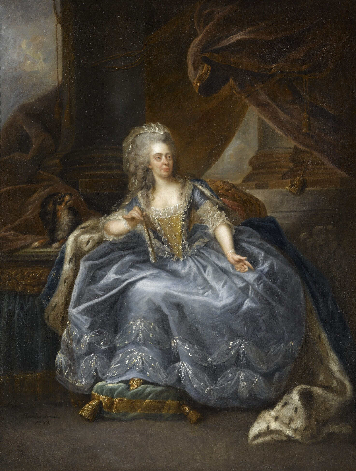 Marie-Adélaïde de France (1732-1800), fille de Louis XV, dite Madame Adélaïde